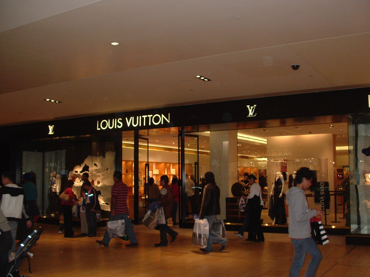 magasin louis vuitton houston